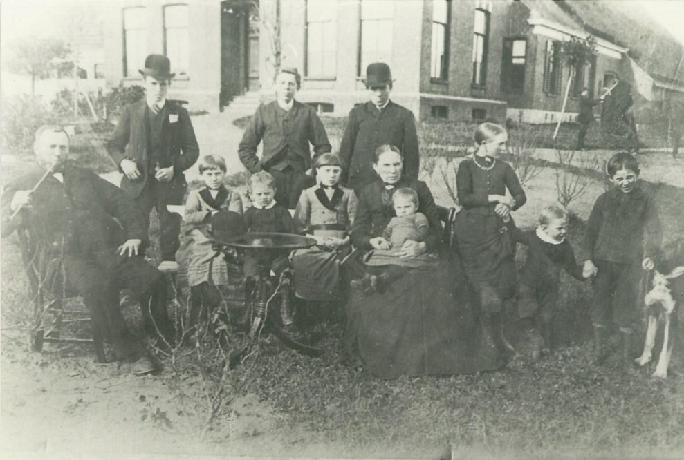 Familie Doornbos (Oosterampt, Warffum, Groningen) ca. 1890